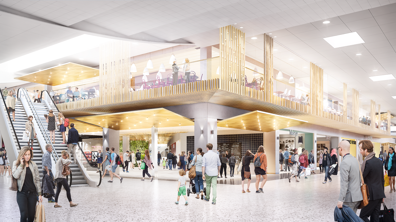 Credit to: Wester Elsner Arkitekter